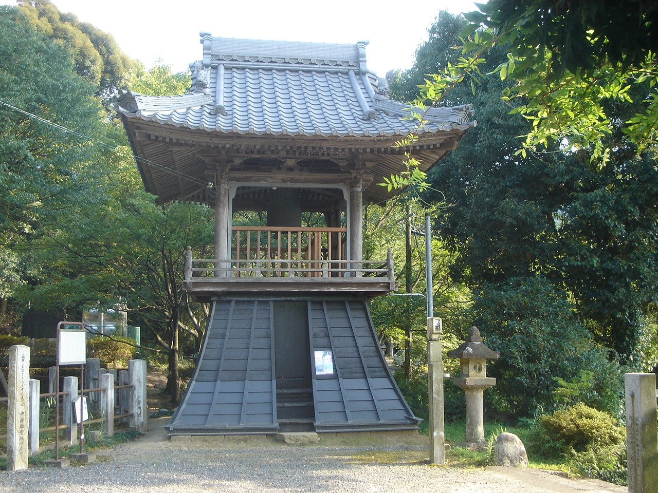 Ganjoji(Temple) in Gifu(願成寺 (岐阜市)の鐘楼堂),Gifu,Gifu,Japan(岐阜県岐阜市)で撮影